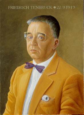 Foto eines Porträts von Friedrich Tenbruck, gemalt von Liselotte Schramm-Heckmann, 1983